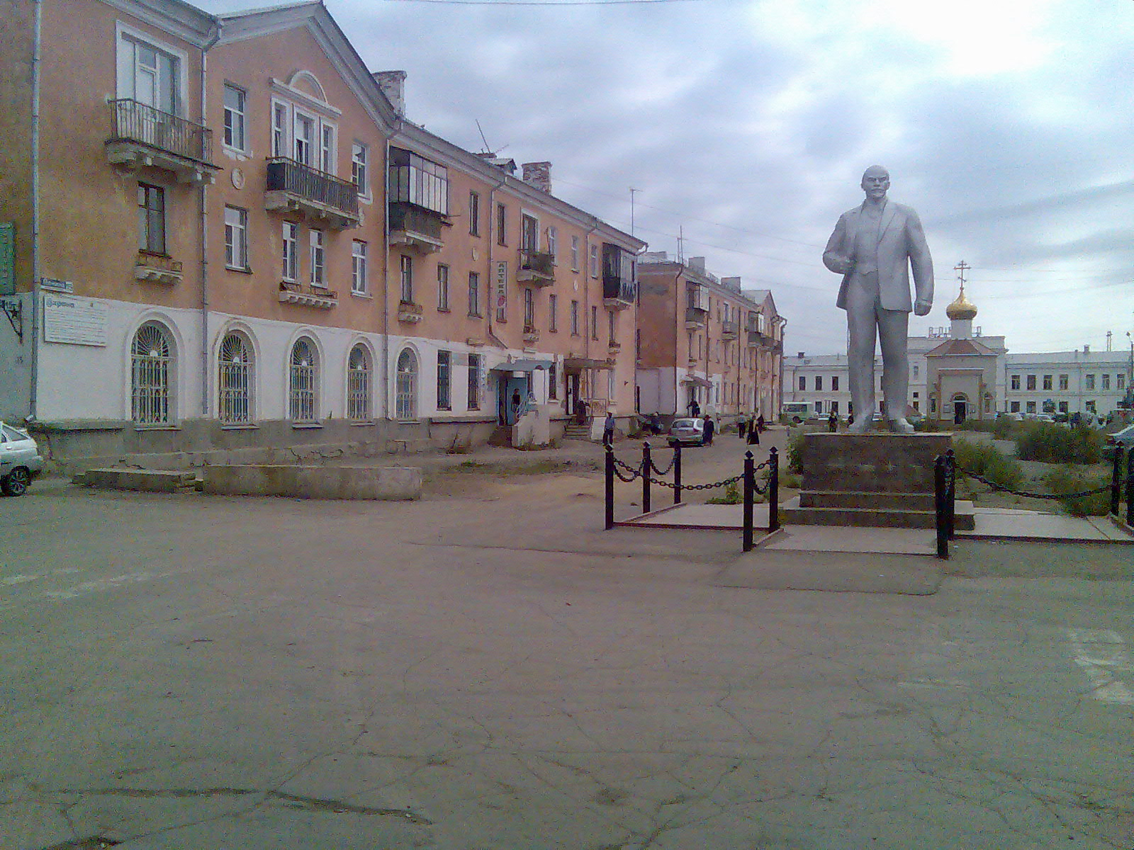 Памятник вождю